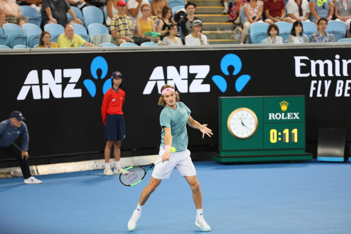 2019 Australian Open